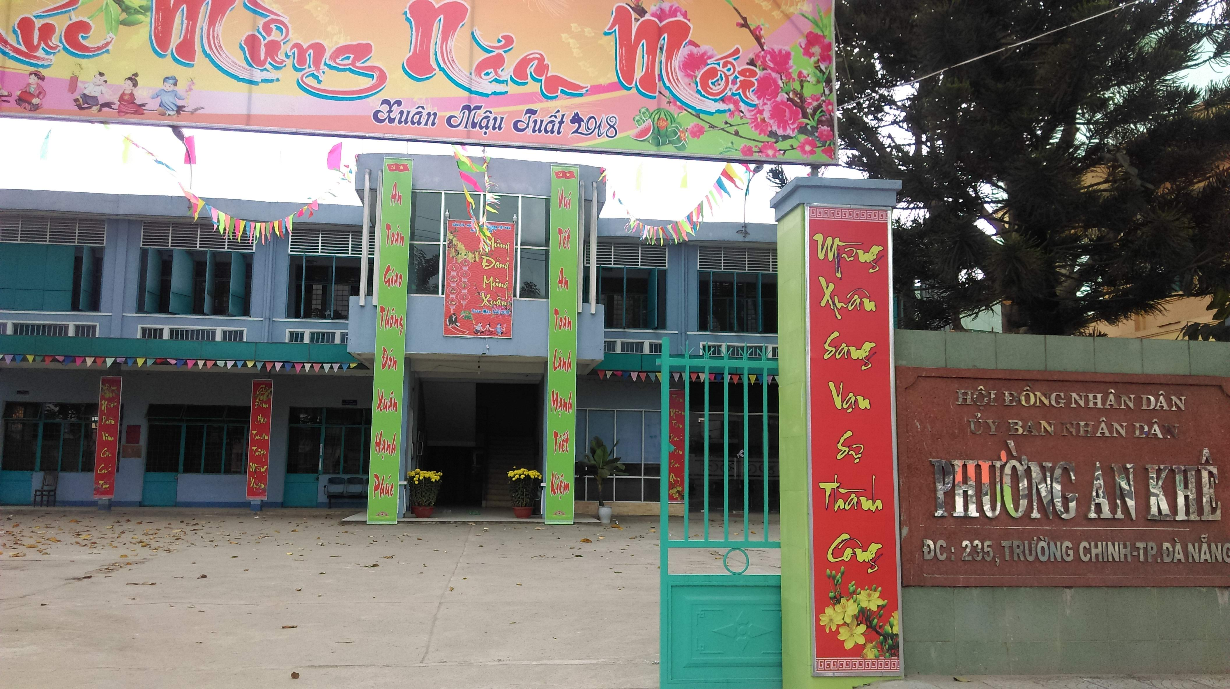 UBND phường An Khê, Thanh Khê, Đà Nẵng